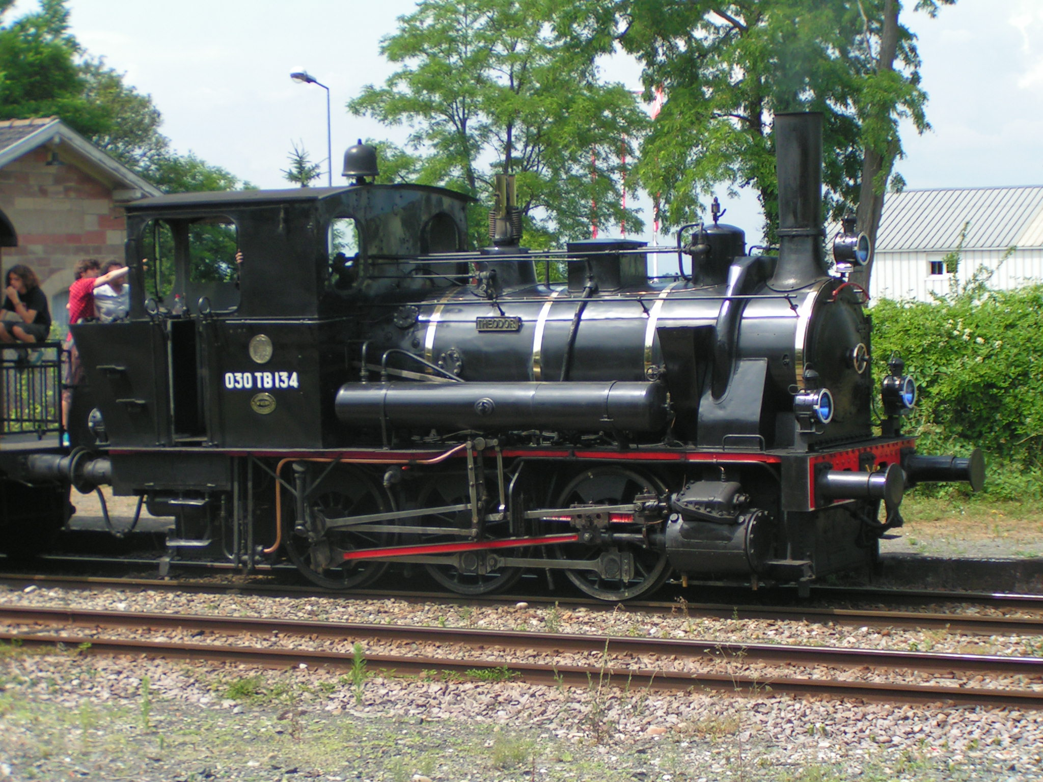 Lokomotive der Museumseisenbahn "Chemin de Fer Touristique du Rhin" beim Bahnhof Volgelsheim